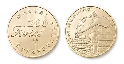 Molnár Ferenc: A Pál utcai fiúk, A magyar ifjúsági irodalom alakjai emlékpénzérme sor, rézötvözet, vert, 2001., Tervező: ifj. Szlávics László, Kibocsátó: Magyar Nemzeti Bank